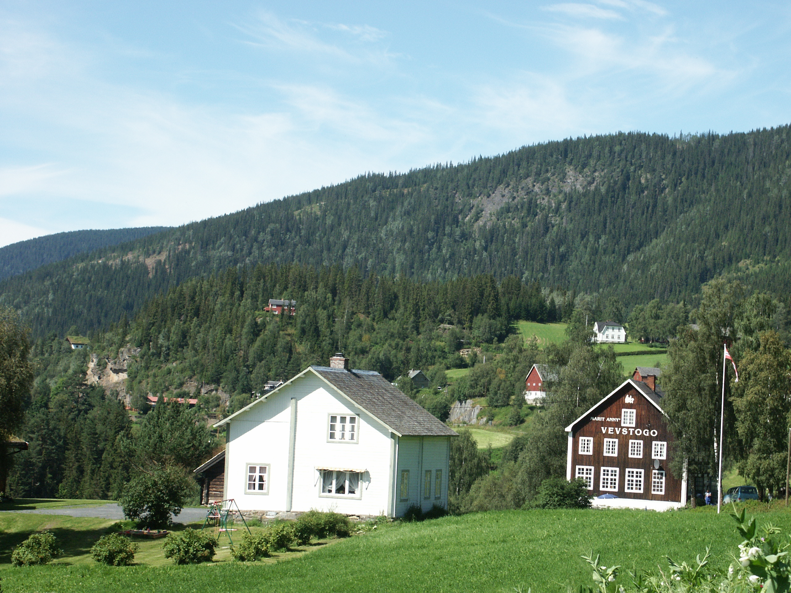 Marit Annys Vevstogo in Vestre Slidre